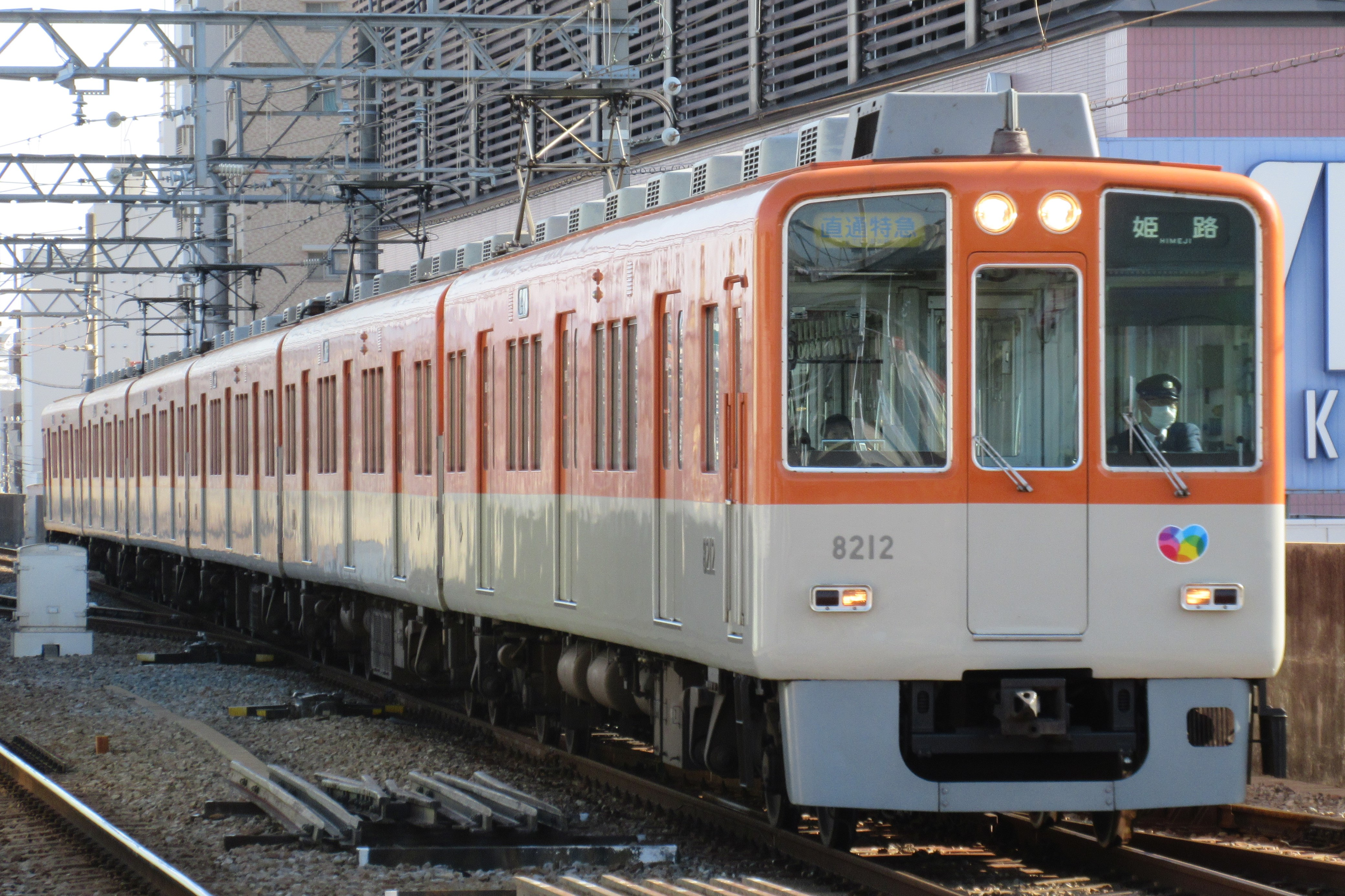 阪神電鉄8212 (明石駅にて)